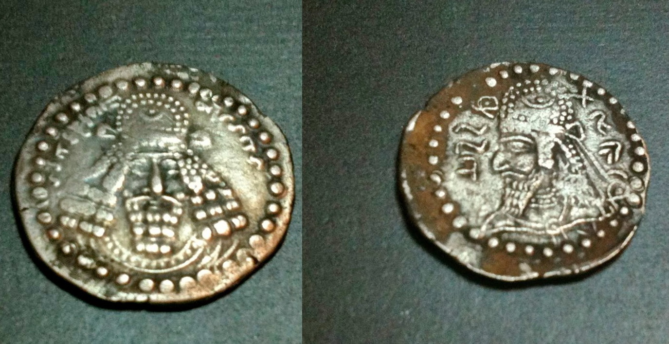 سکه اردشیر بابکان از مجموعه شخصی f@j